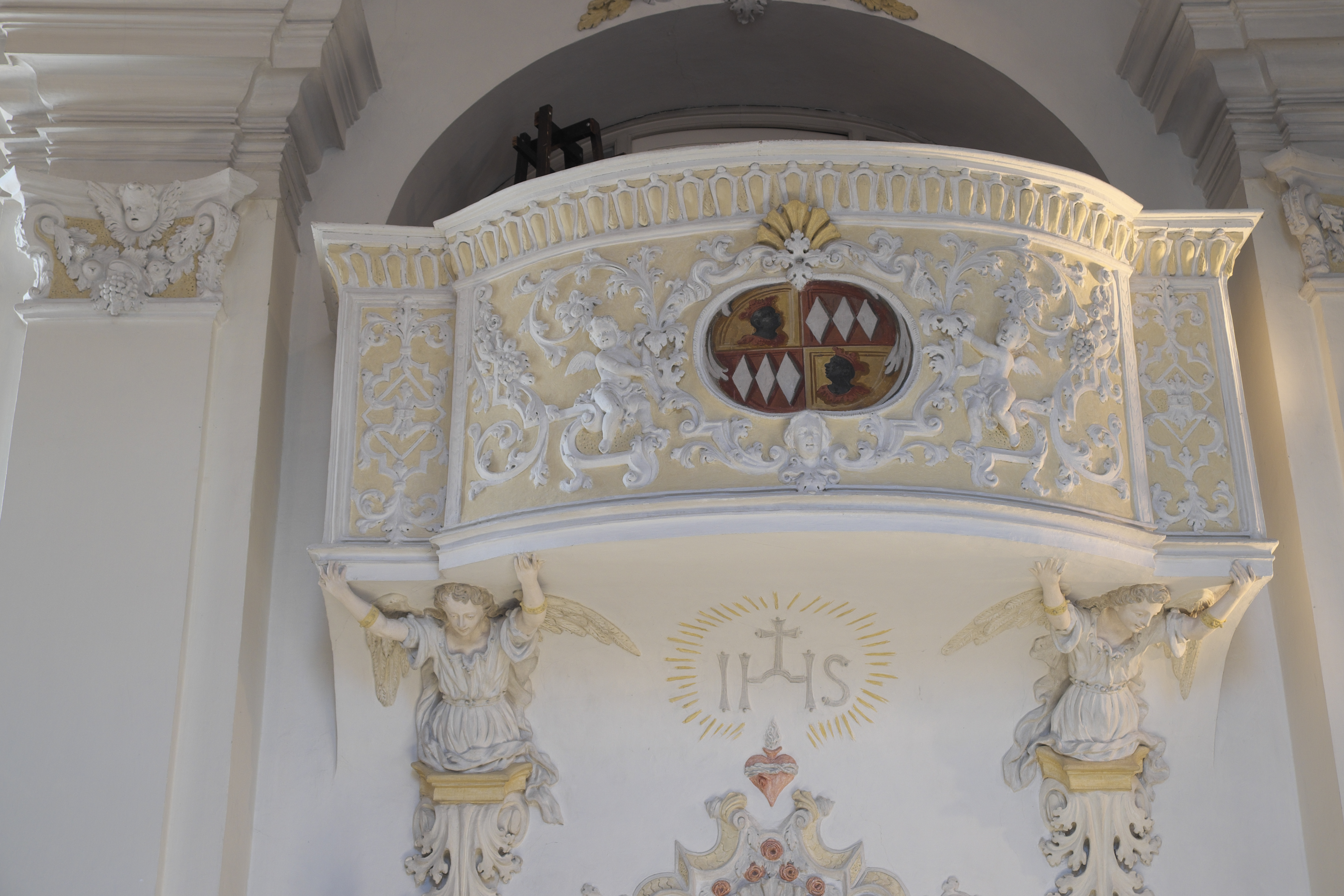 Katholische Pfarrkirche St. Valentin in Unterföhring im Landkreis München (Bayern/Deutschland), Oratorium über der Sakristei